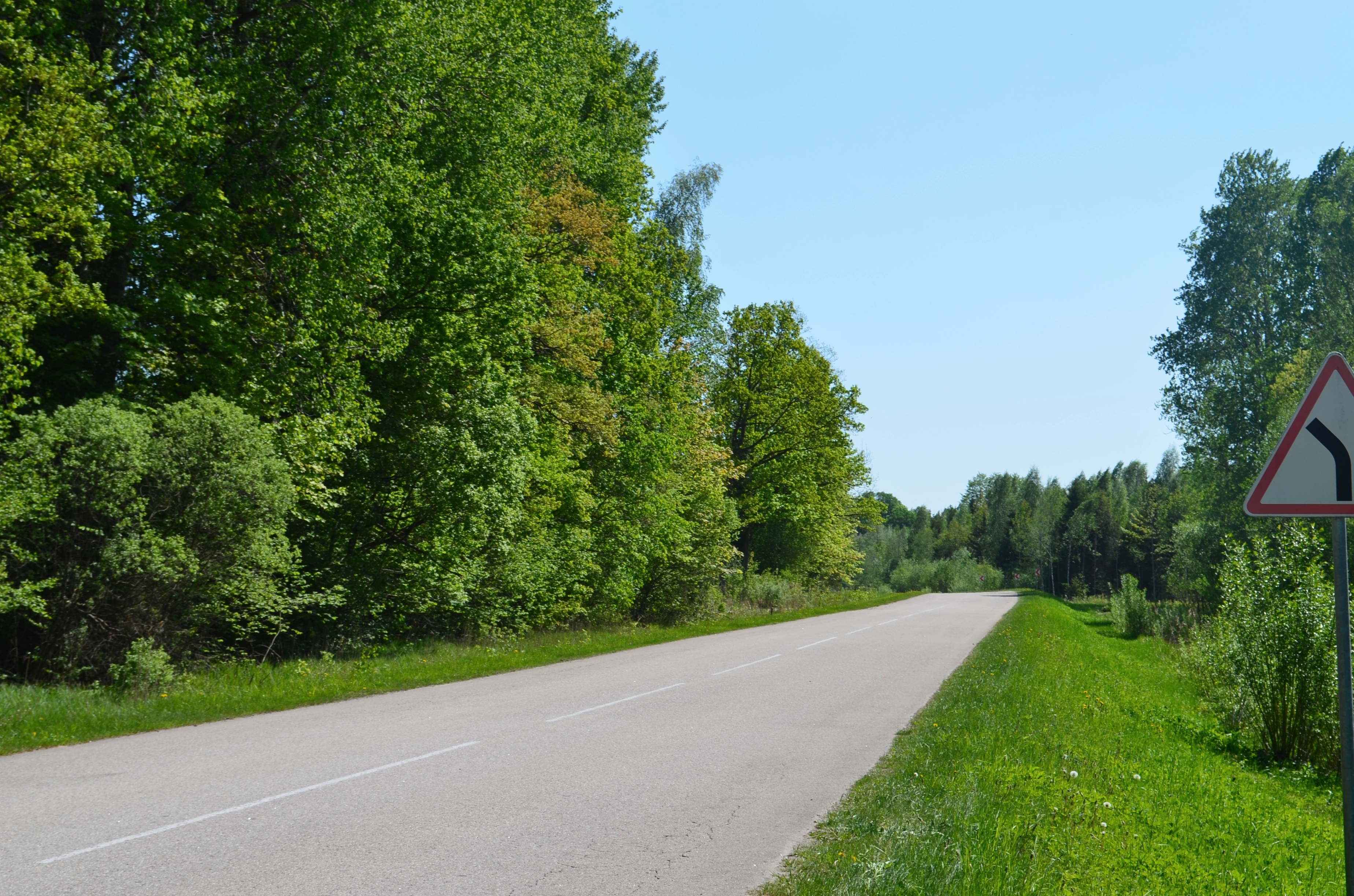 Užulėnio miškas (Taujėnų miškai), Taujėnų sen., Ukmergės raj.